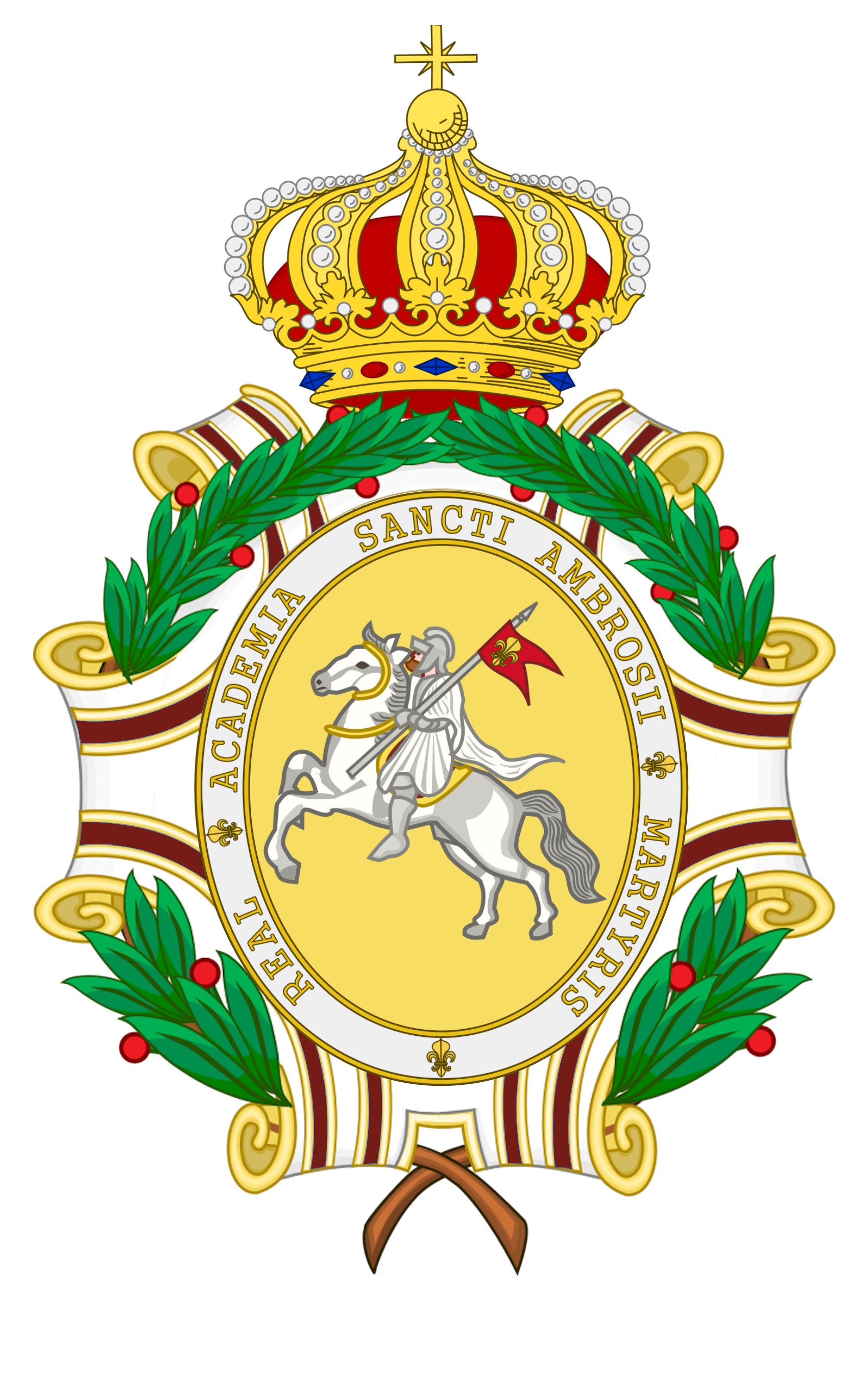 Královská akademie sv. Ambrože, mučedníka